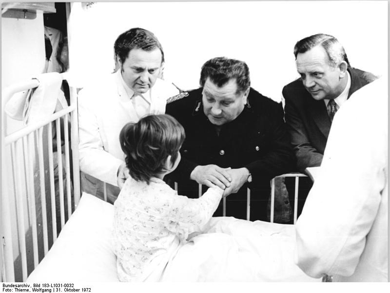 ADN-ZB Thieme-31.10.1972-th-Bez. Karl-Marx-Stadt: Zugunglück-Fürsorge für Verletzte-Robert Menzel (Mitte), Stellvertreter des Ministers für Verkehrswesen, und Heinz Arnold (r.), Vorsitzender des Rates des Bezirkes Karl-Marx-Stadt, besuchten am 31.10.1972 den kleinen Patienten R. Jung und weitere Verletzte des Zugunglücks vom 30.10.1972 im Werdauer Krankenhaus. S. ADN-Meldung vom 31.10.1972!